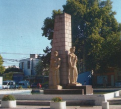 Fotografía de la plazoleta con el monumento al Indio en la localidad de Guaymallén (provincia de Mendoza) Argentina. Escultor: Mariano Pagés